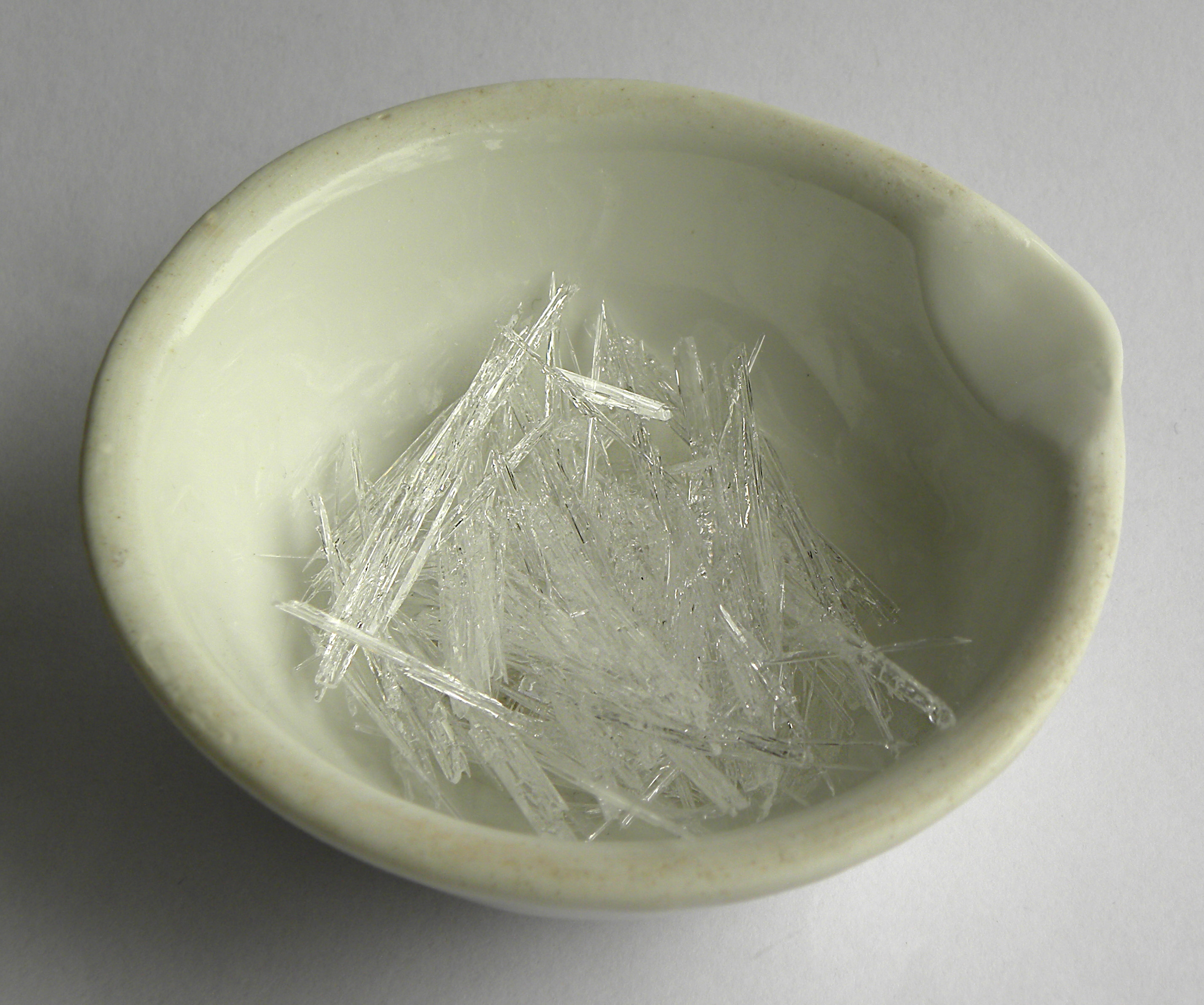 Kryształy fenolu w formie igieł